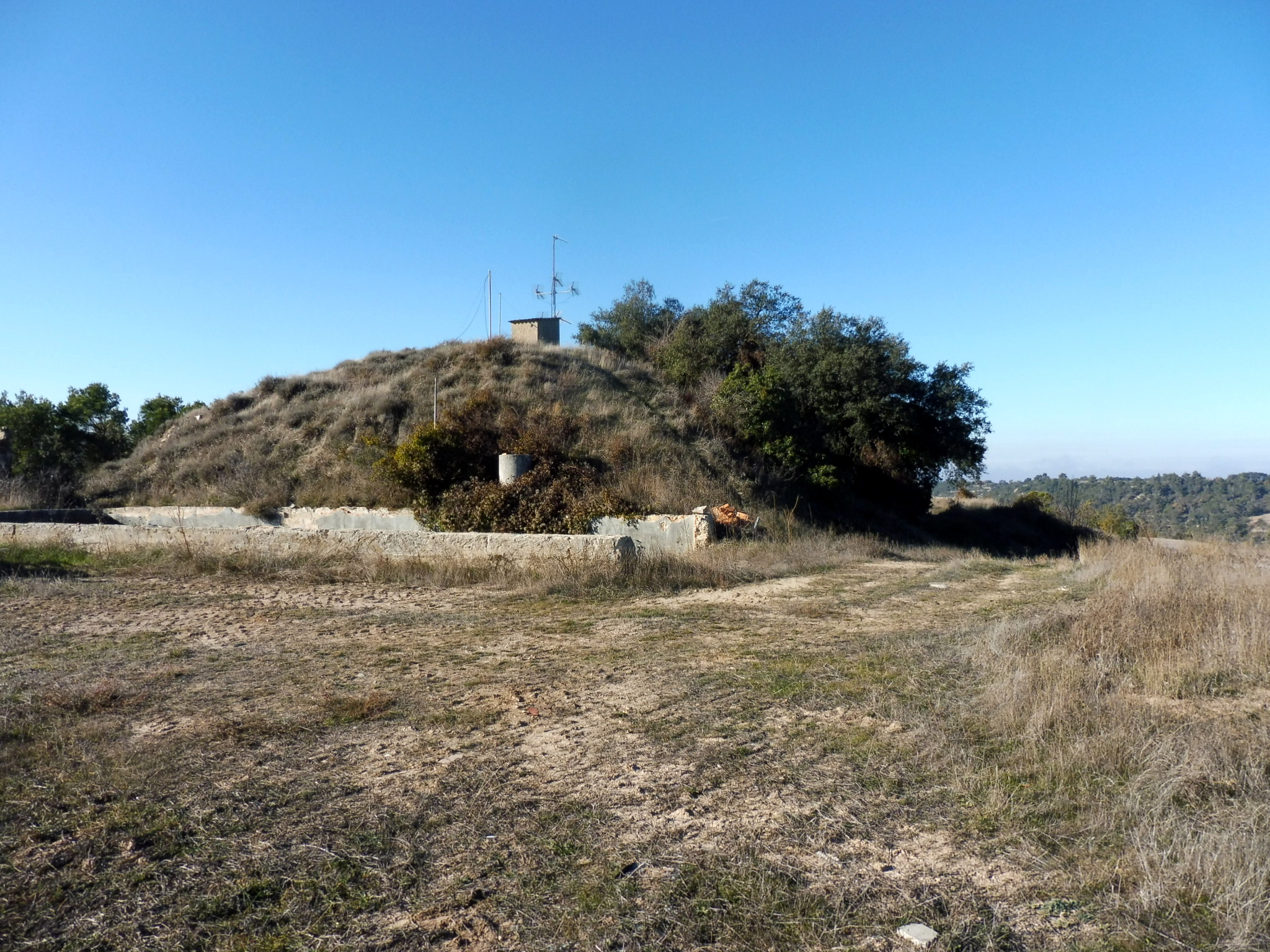 Castell d'Albió (Llorac): turó format per les restes del castell